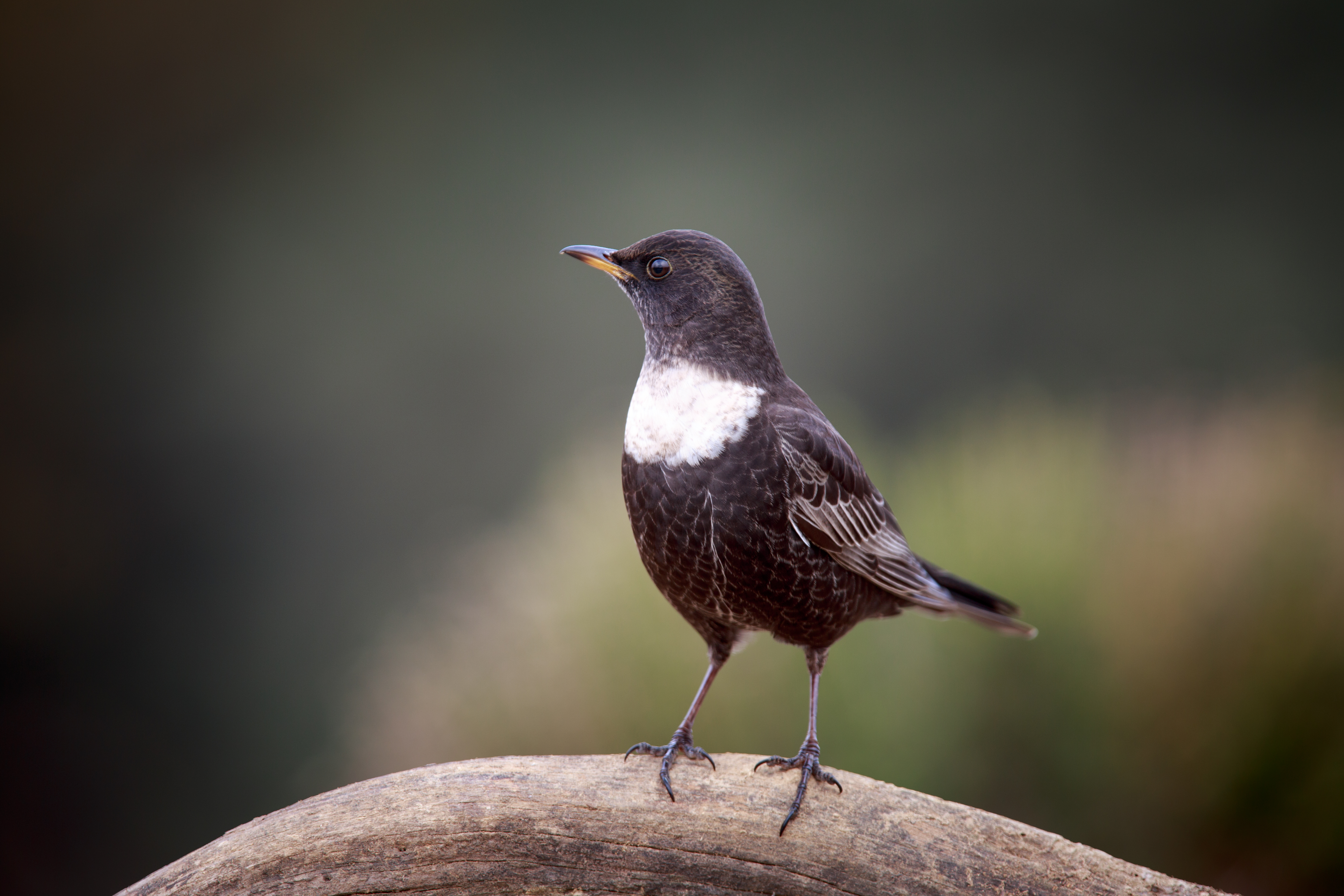 Merle à plastron sous-espèce torquatus, Espagne